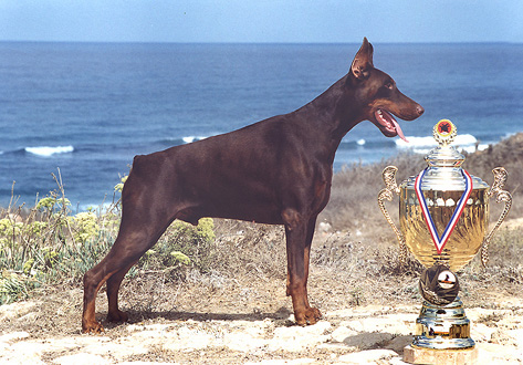 דוברמן אלוף עולם. צילום: יגאל פרדו